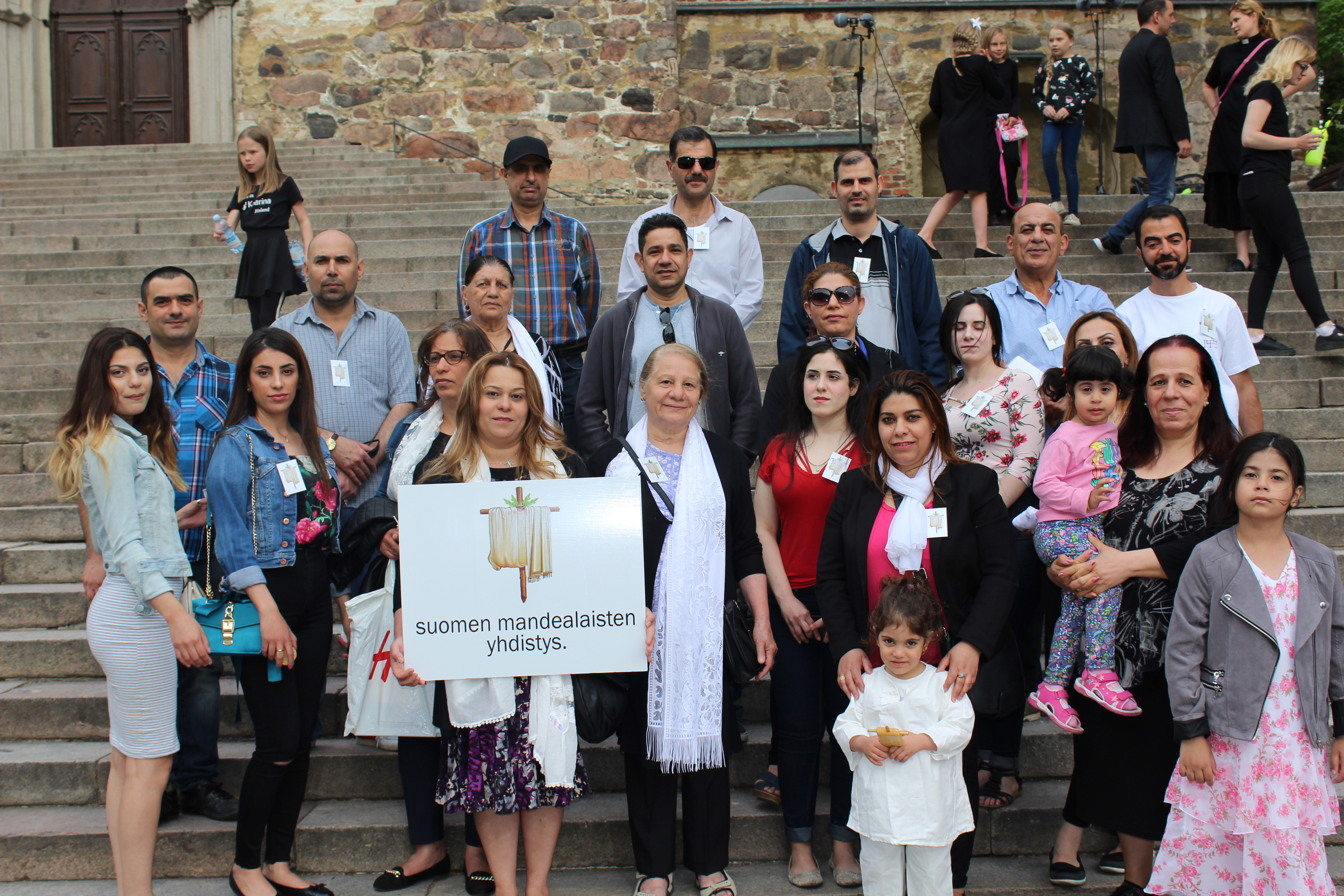 Suomen Mandean Yhdistys